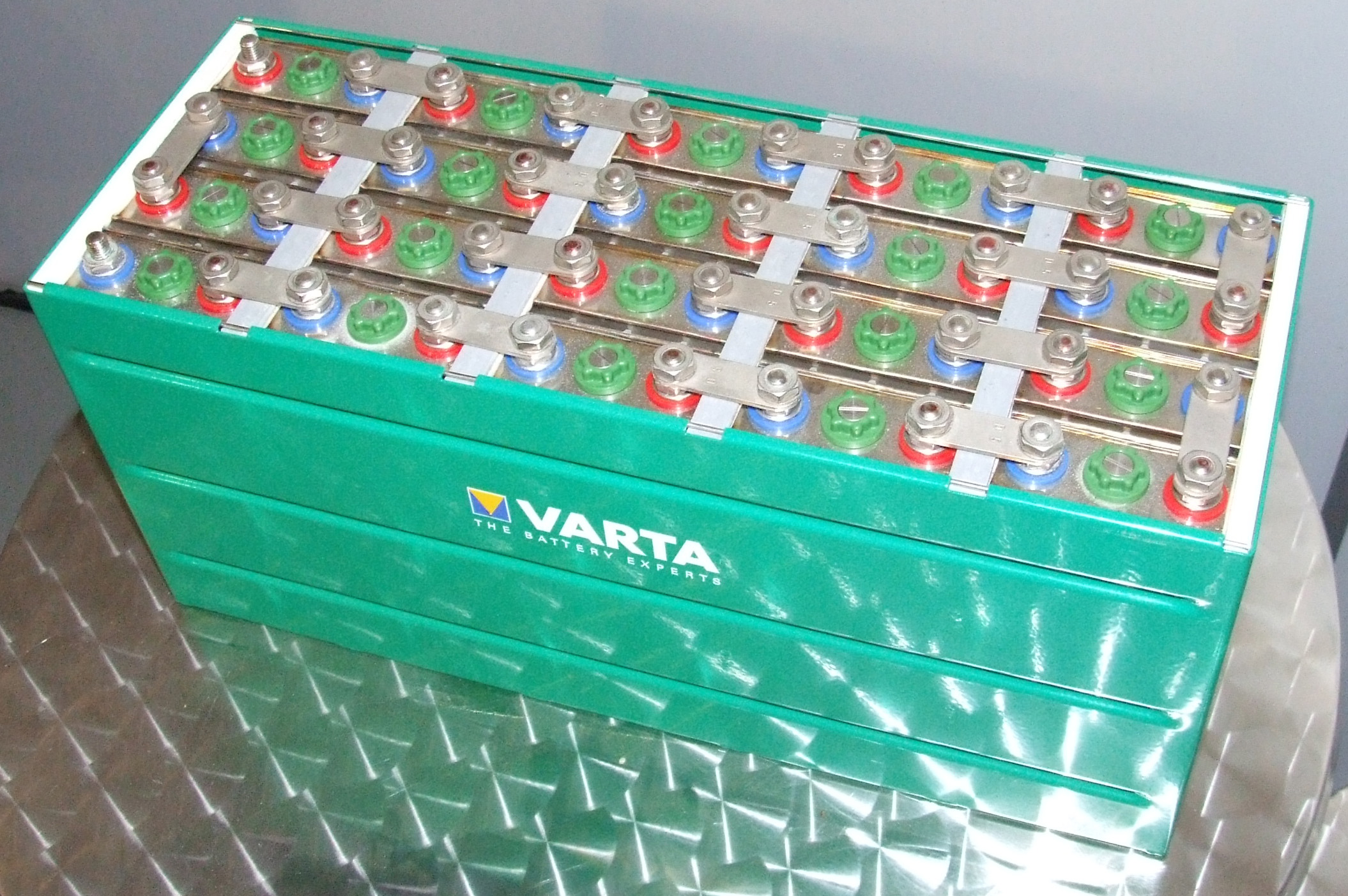 Nickel-Metallhydrid-Batterie von Varta, Museum Autovision, Altlußheim, Deutschland